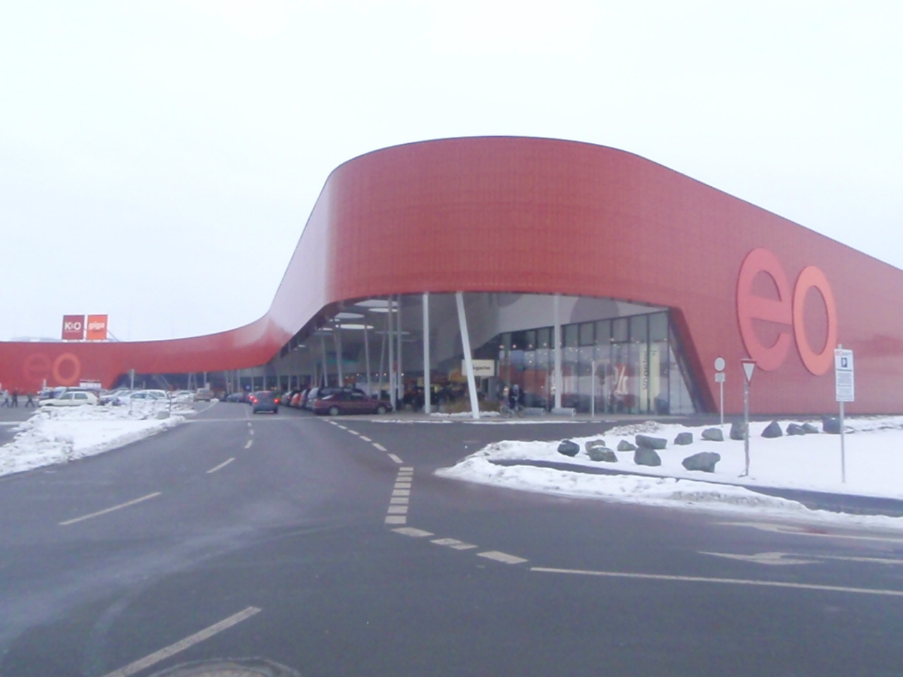 Einkaufszenter Oberwart